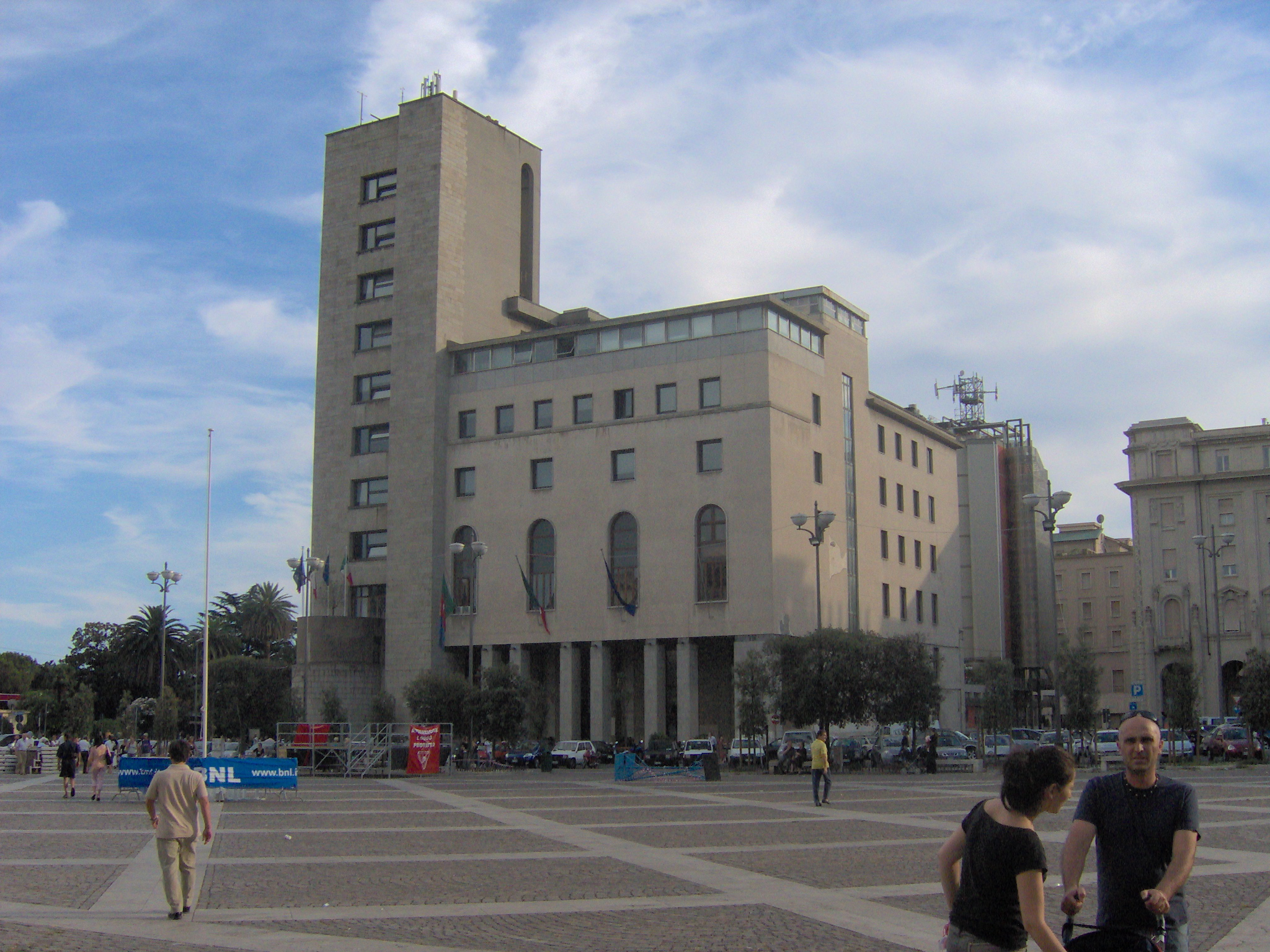 La Spezia - Il Municipio